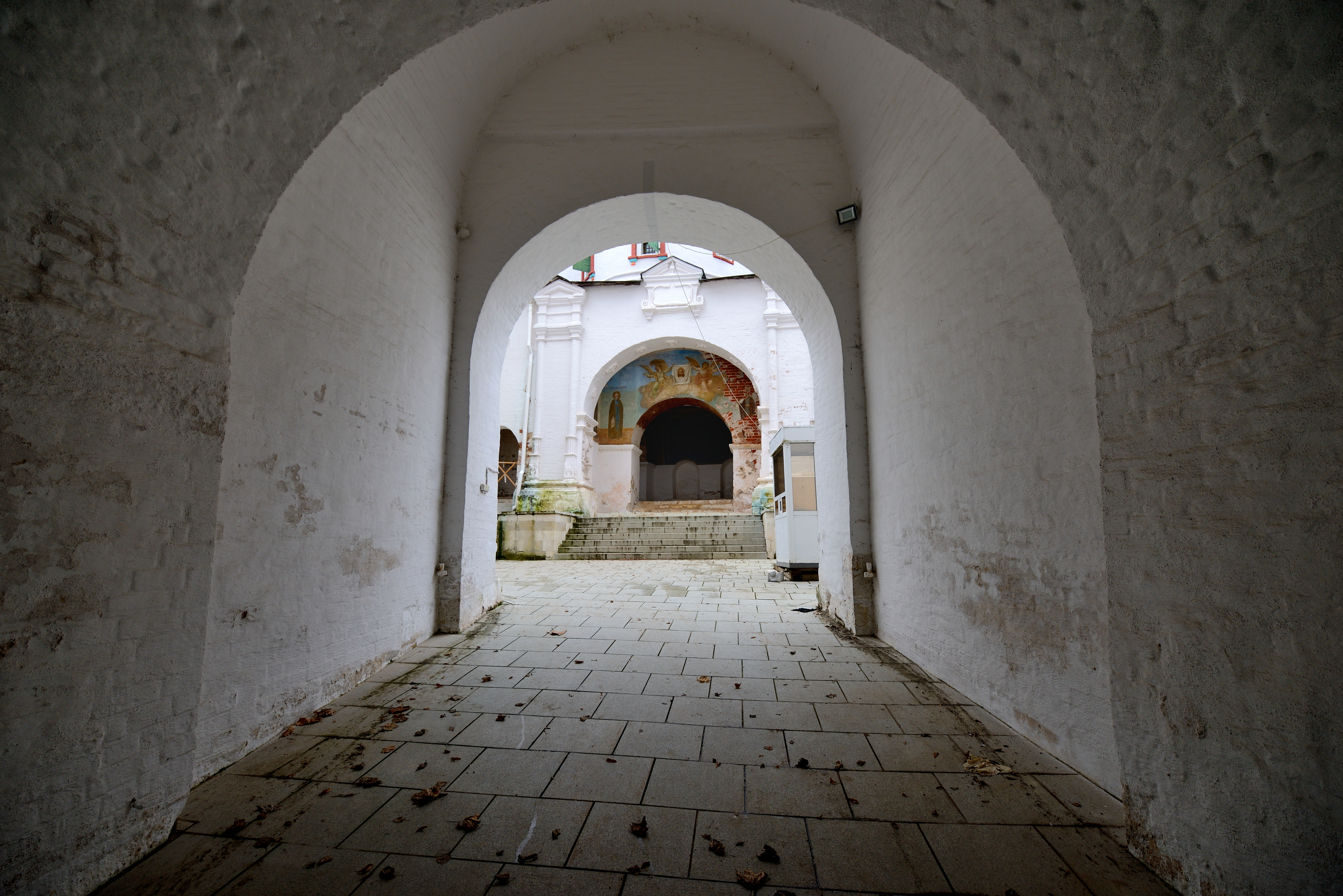 Вид на вход на лестницу подклет Троицкую надвратную церковь из под свода Троицких надвратных ворот Саввино-Сторожевского Ставропигиального мужского монастыря